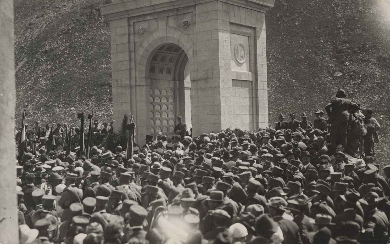 Cerimonia inaugurale del Monumento Ossario per caduti in guerra al Passo dello Stelvio 31 luglio 1932-X°